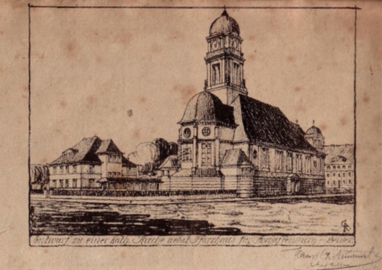 Entwurf zu einer katholischen Pfarrkirche nebst Pfarrhaus für Aschaffenburg-Leider